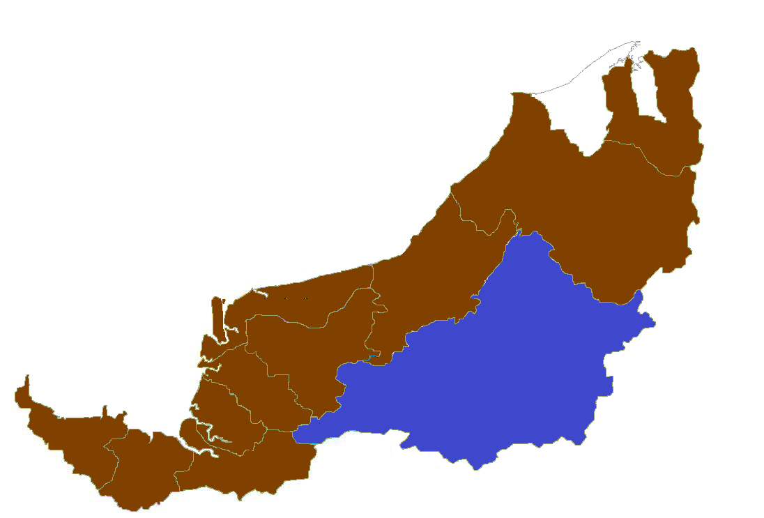 Kapit Division